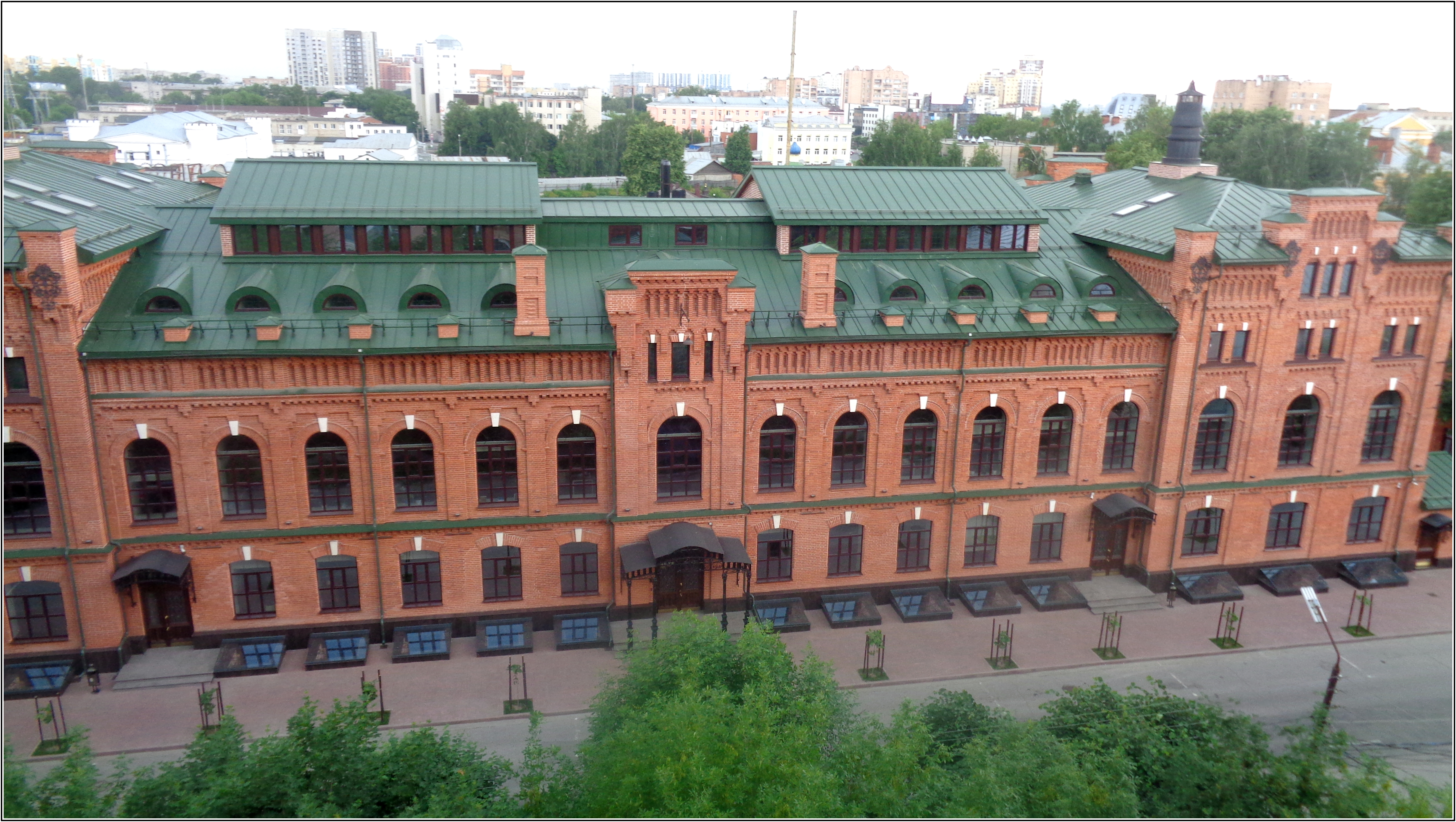 Казенный винный склад, Рязань, 1899 - 1900. Фото 2020 г.